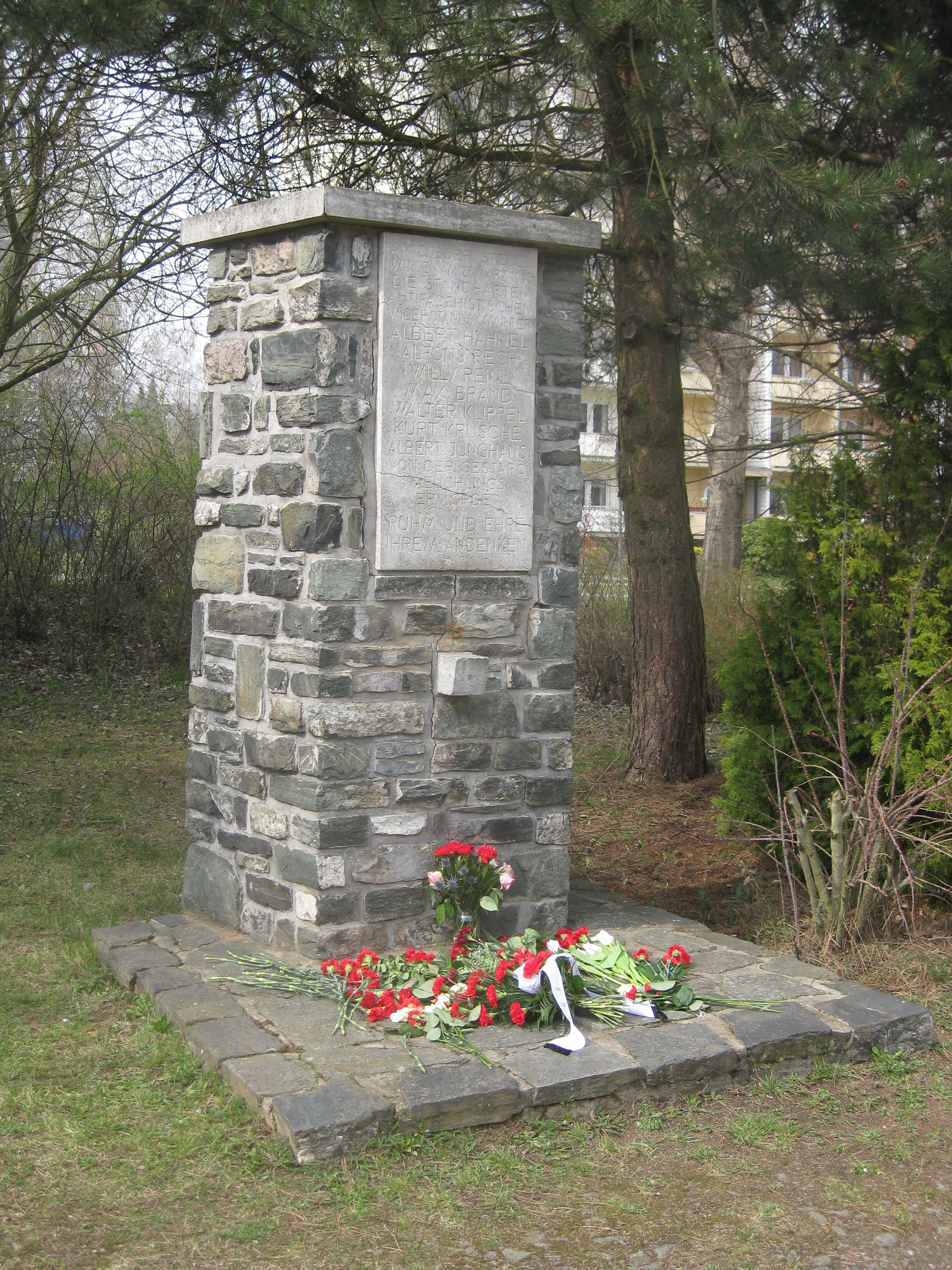 Denkmal des Chemnitzer Bildhauers Hanns Diettrich für sieben in Hutholz am 27. März 1945 von der Gestapo ermordete Antifaschisten